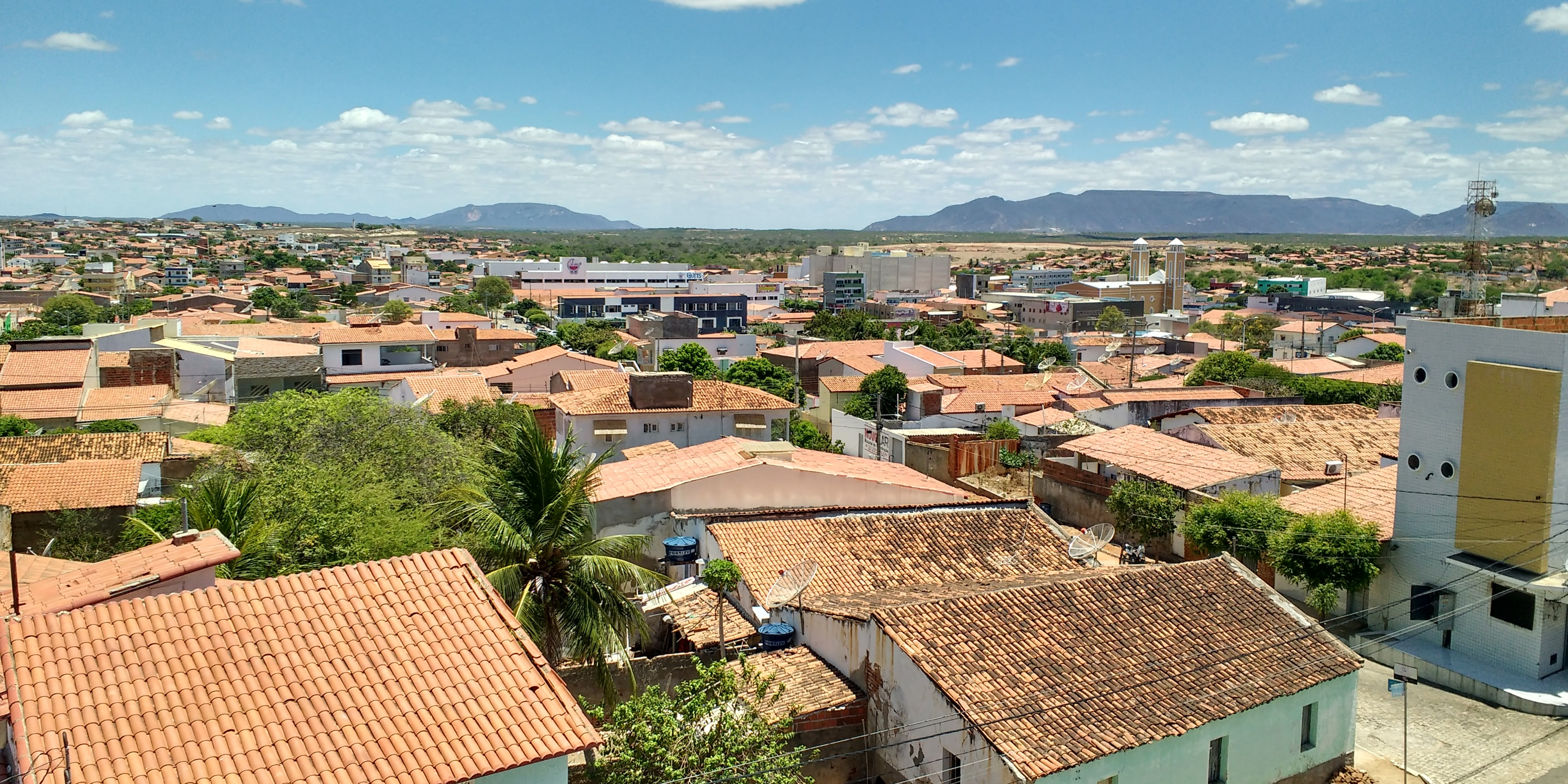 Parcial da cidade de Pau dos Ferros, Rio Grande do Norte (Brasil)